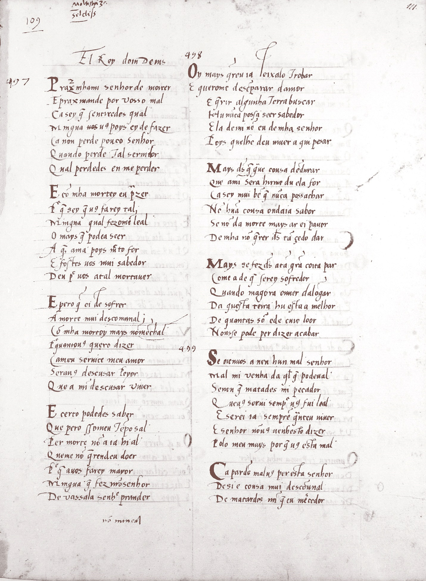 Página do Cancioneiro da Biblioteca Nacional.